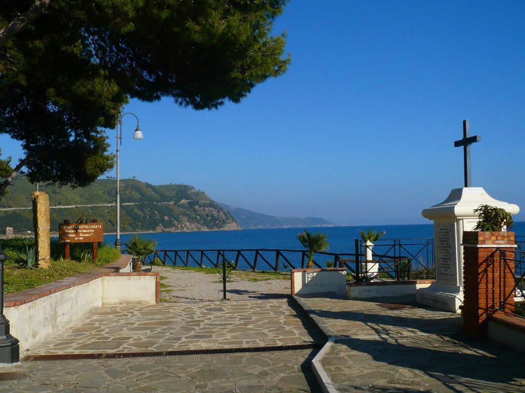 La croce luminosa a ogliastro marina di castellabate in piazza giovanni paolo II